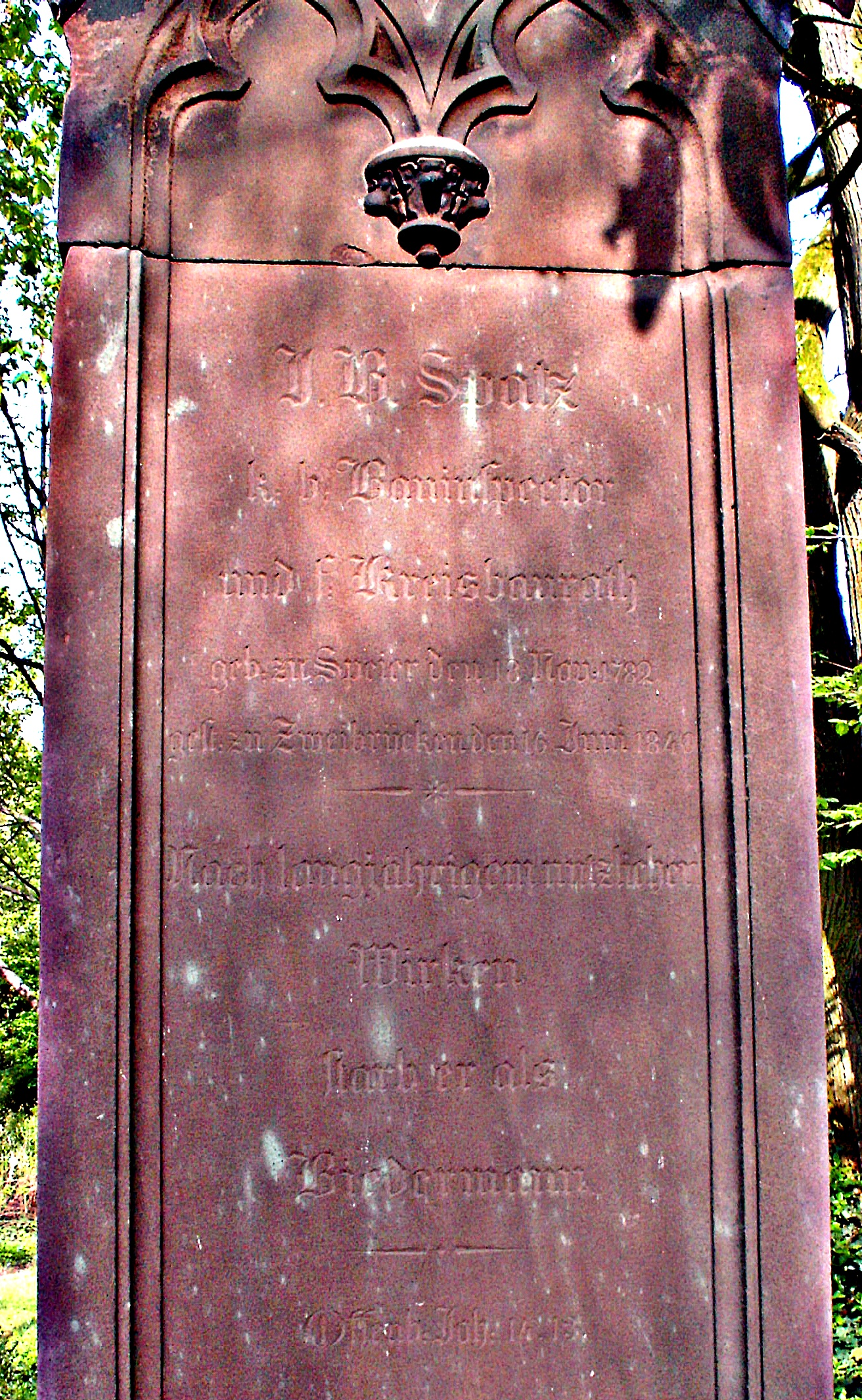 Grabstein des Architekten und Baurates Johann Bernhard Spatz (1782–1840), Alter Friedhof Speyer